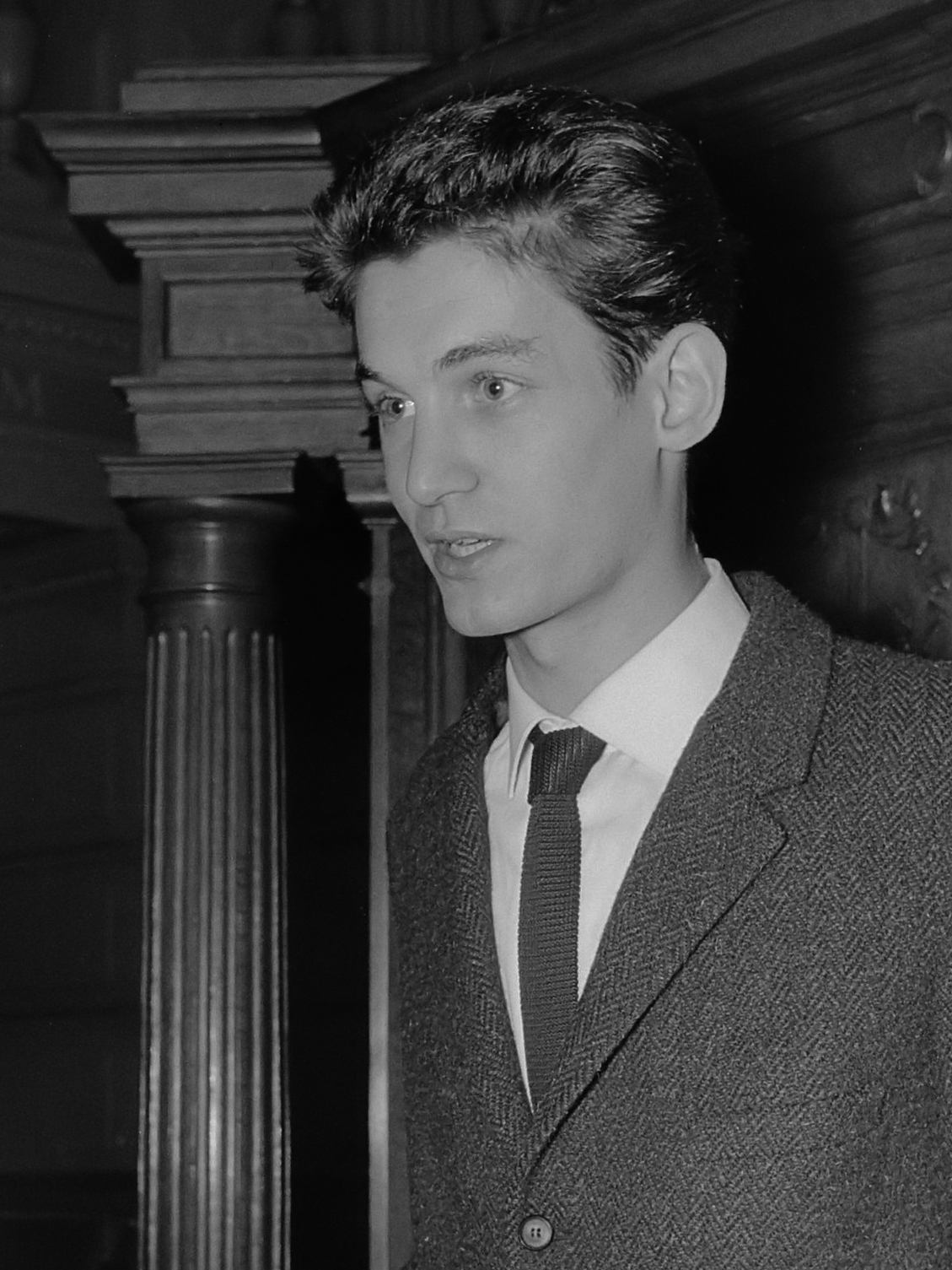 Uitreiking Reina Prinsen Geerligsprijs. Prijswinnaar Peter van Gestel leest voor uit eigen werk 24 november 1961